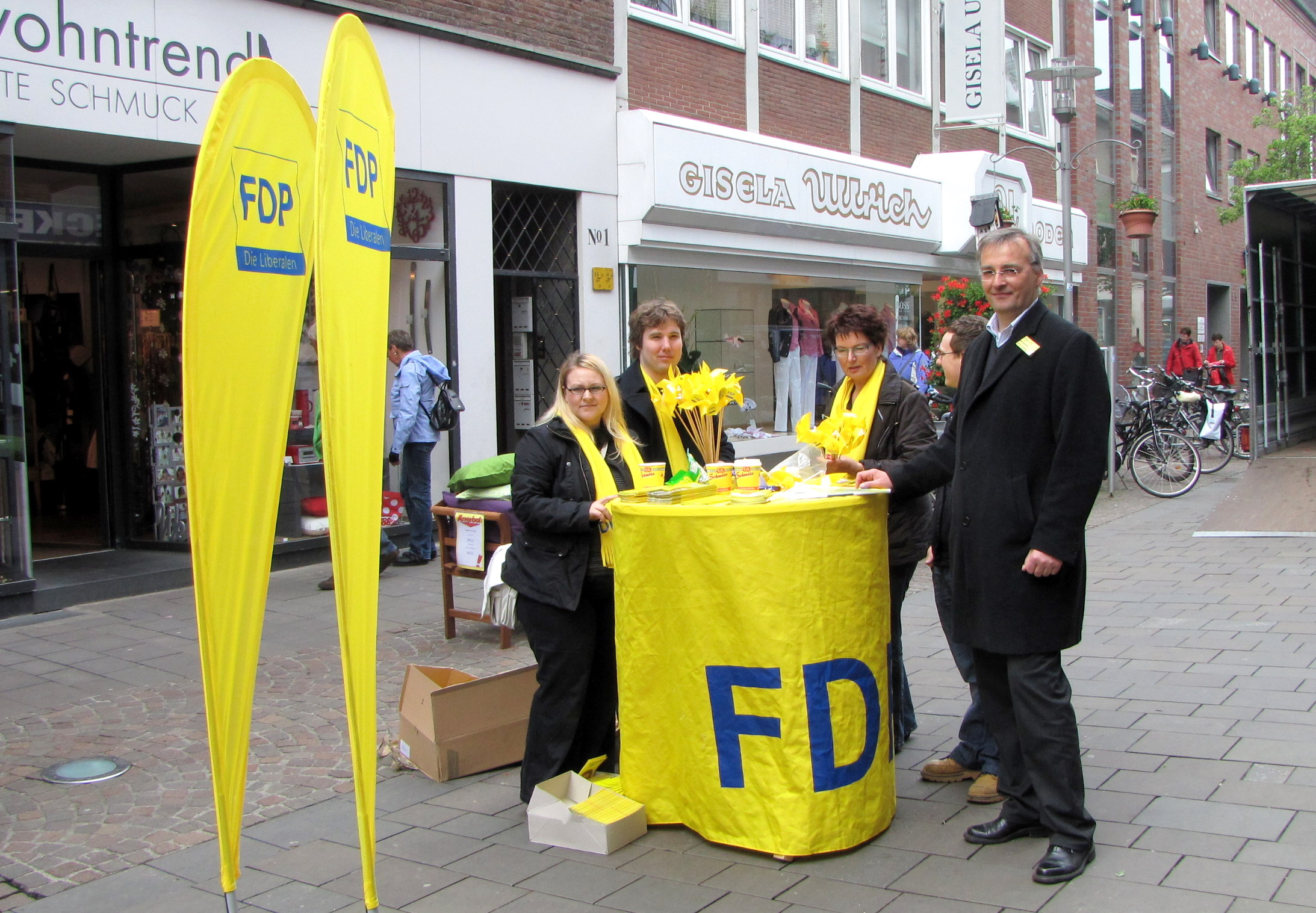 Bocholt, Stand der FDP zur Landtagswahl NRW 2010